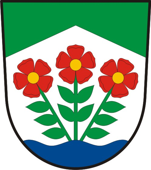 Kytín